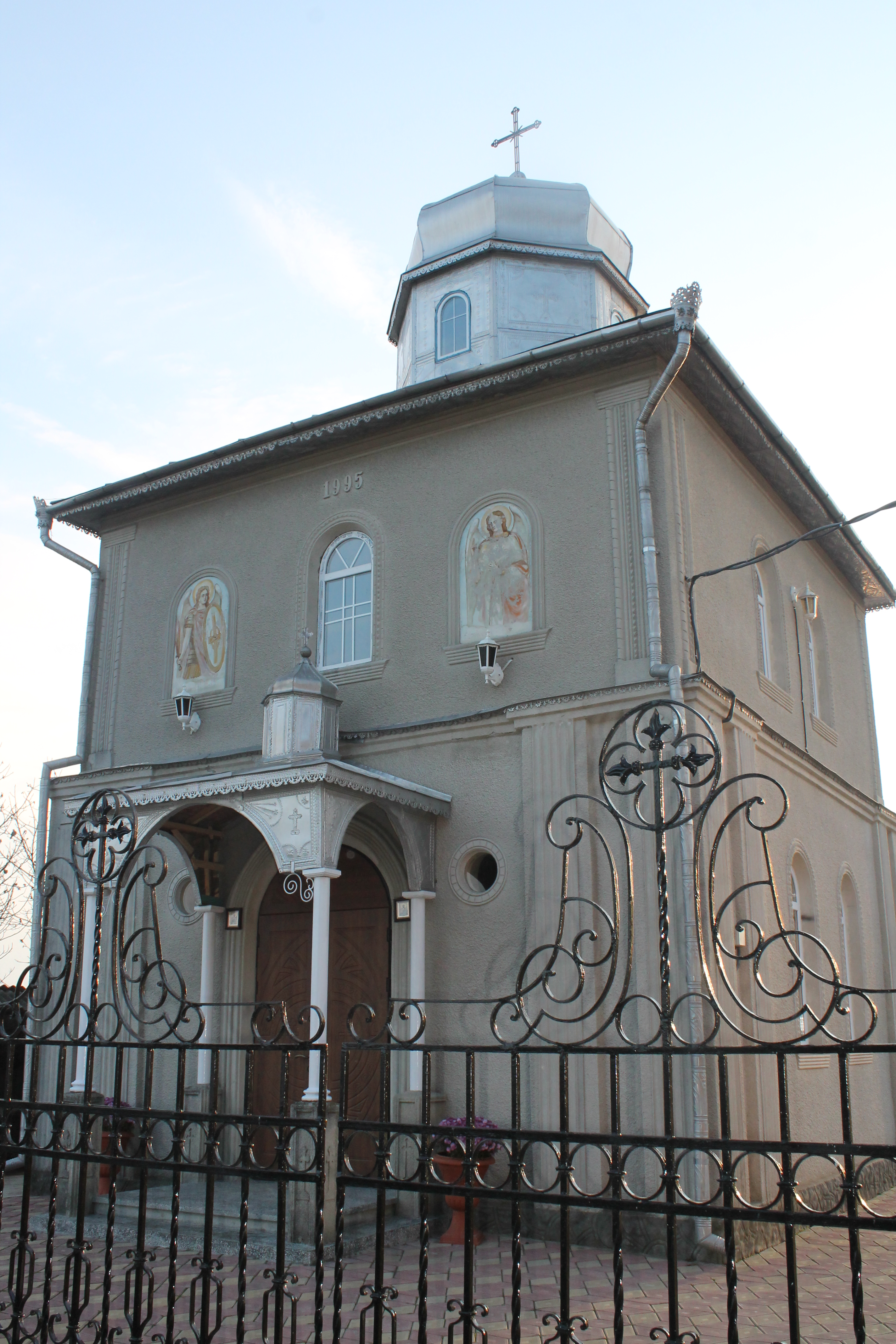 Архангельська церква (дер.), Цурінь